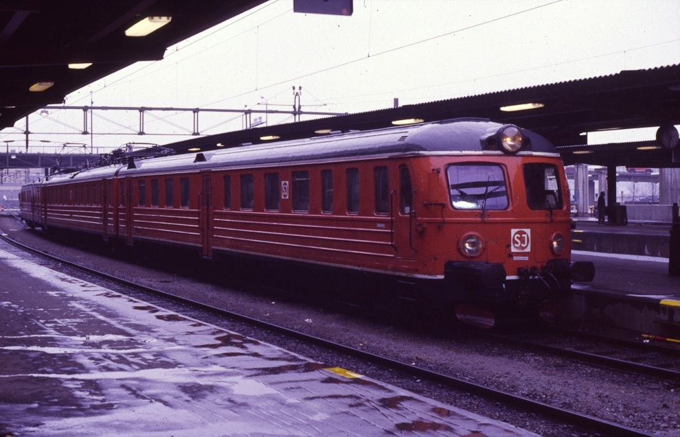 X5 på Stockholm C 1985. Foto: Bengt Persson